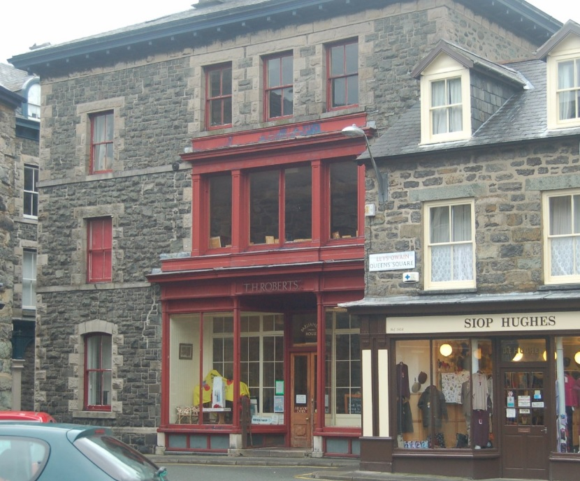 Caffi T.H.Roberts, Llys Owain, Dolgellau - lleoliad yr hen senedd-dy